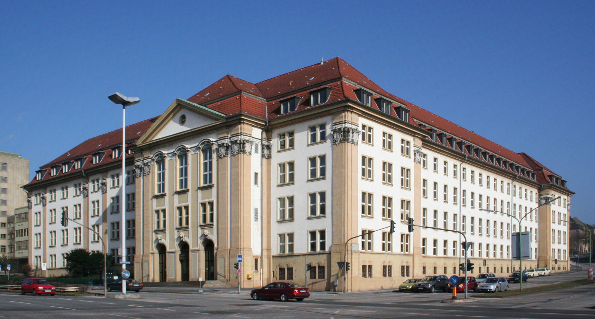 Description: Amts- und Landgericht Hagen, Heinitzstr. 42 in Hagen Source: selbst fotografiert Date: 19. März 2006 Author: Bubo